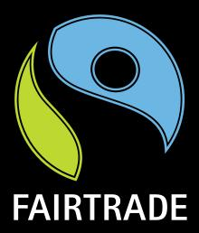 Fairtrade LOGO